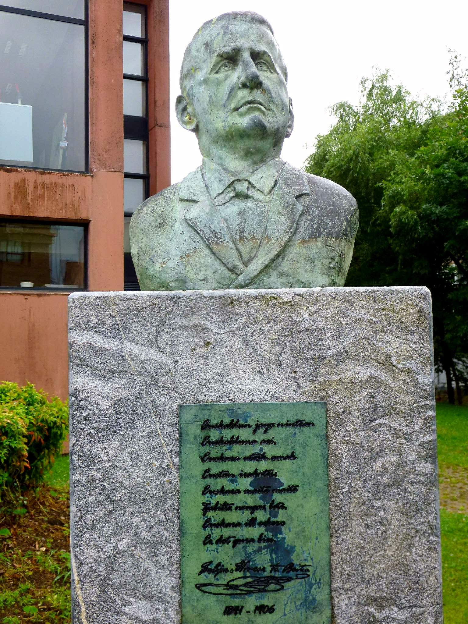 Durango (Vizcaya) - Monumento al poeta Felipe Arrese Beitia